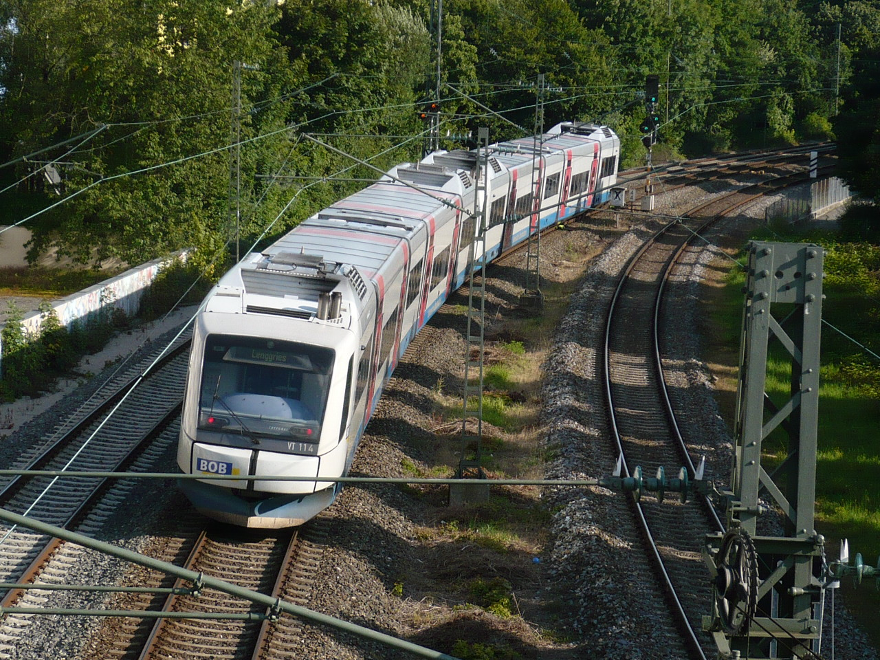 Integral - eingesetzt von der Bayrischen Oberlandbahn. Bild zeigt einen Streckenteil in München zwischen den Haltestellen Harras und Heimeranplatz.